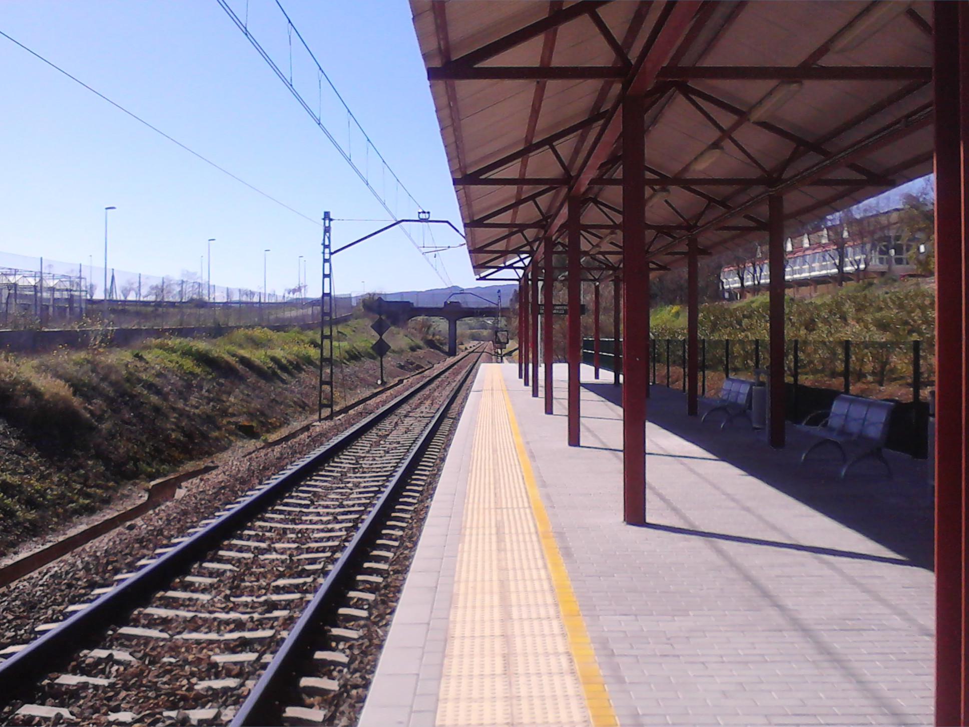 Parada de tren del Campus de Rabanales de la Universidad de Córdoba (España).